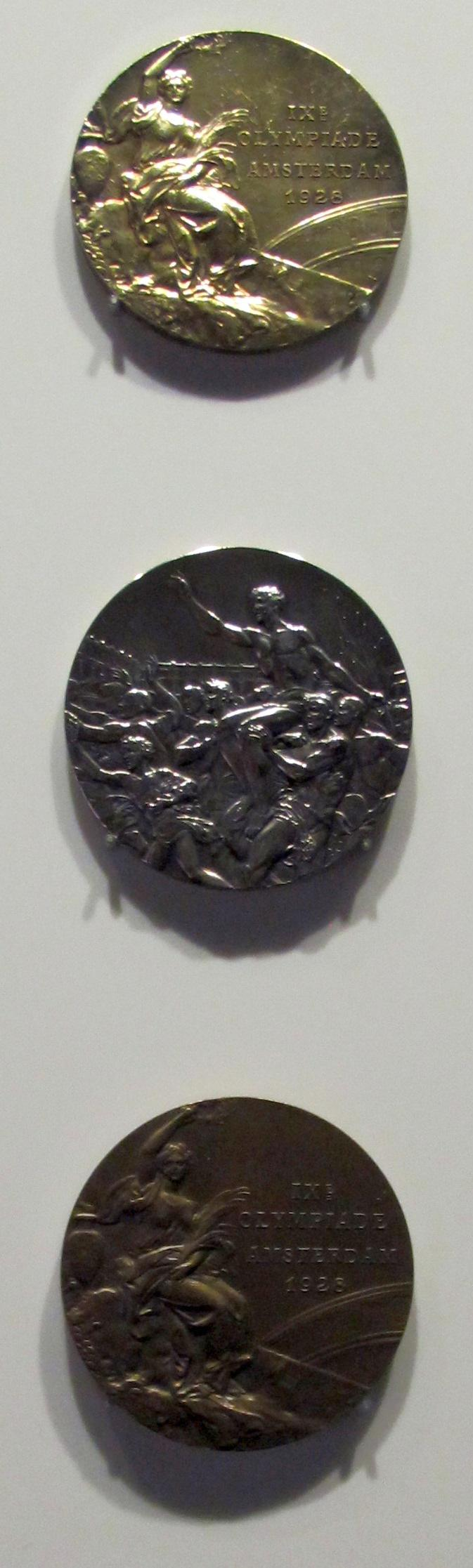 Musée Olympique, Losanna